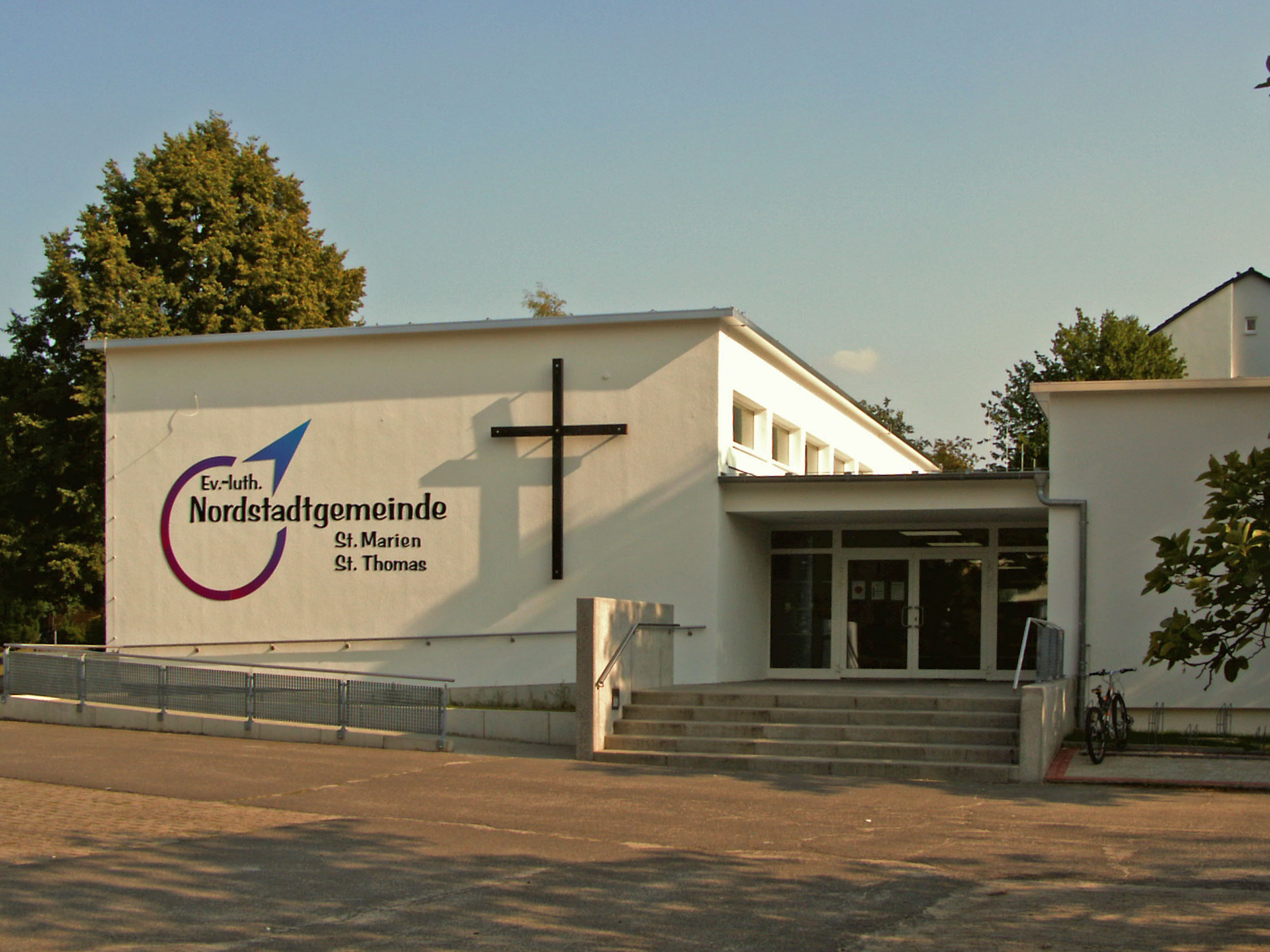 Evangelisch-lutherisches Gemeindehaus St. Thomas in Wolfsburg, Stadtteil Teichbreite